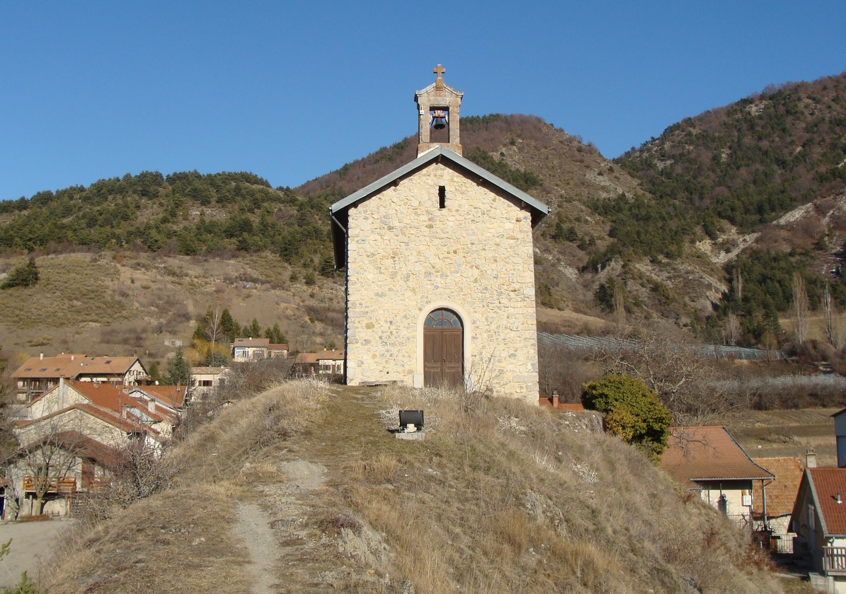 L'église de Saint-Auban-d'Oze (Hautes-Alpes) sur la butte dominant le village.